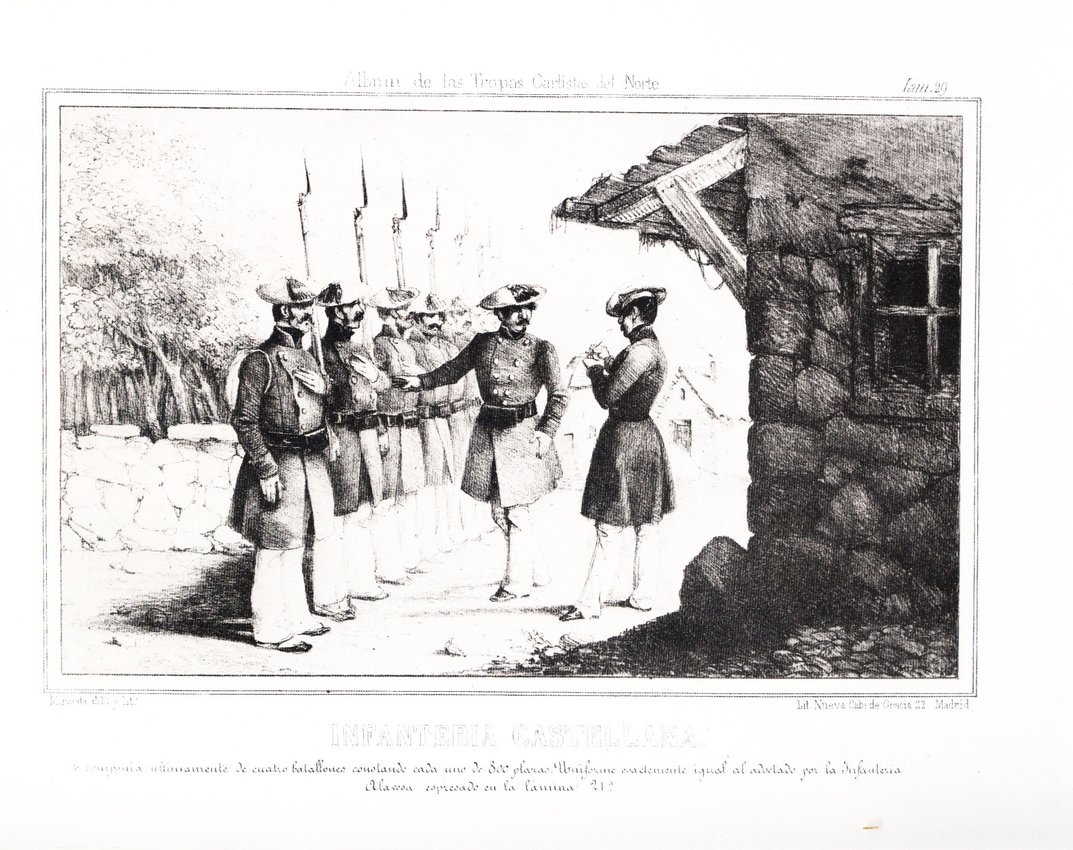 Infantería Castellana. "Albúm de las Tropas Carlistas del Norte". Madrid, sin fecha. (184?)